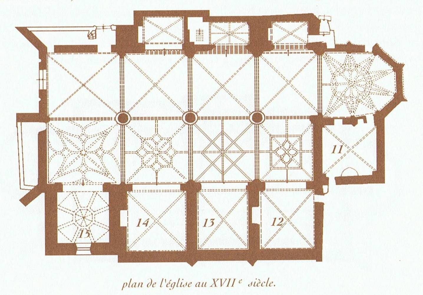 Plan église Saint Nicolas au 17è siècle